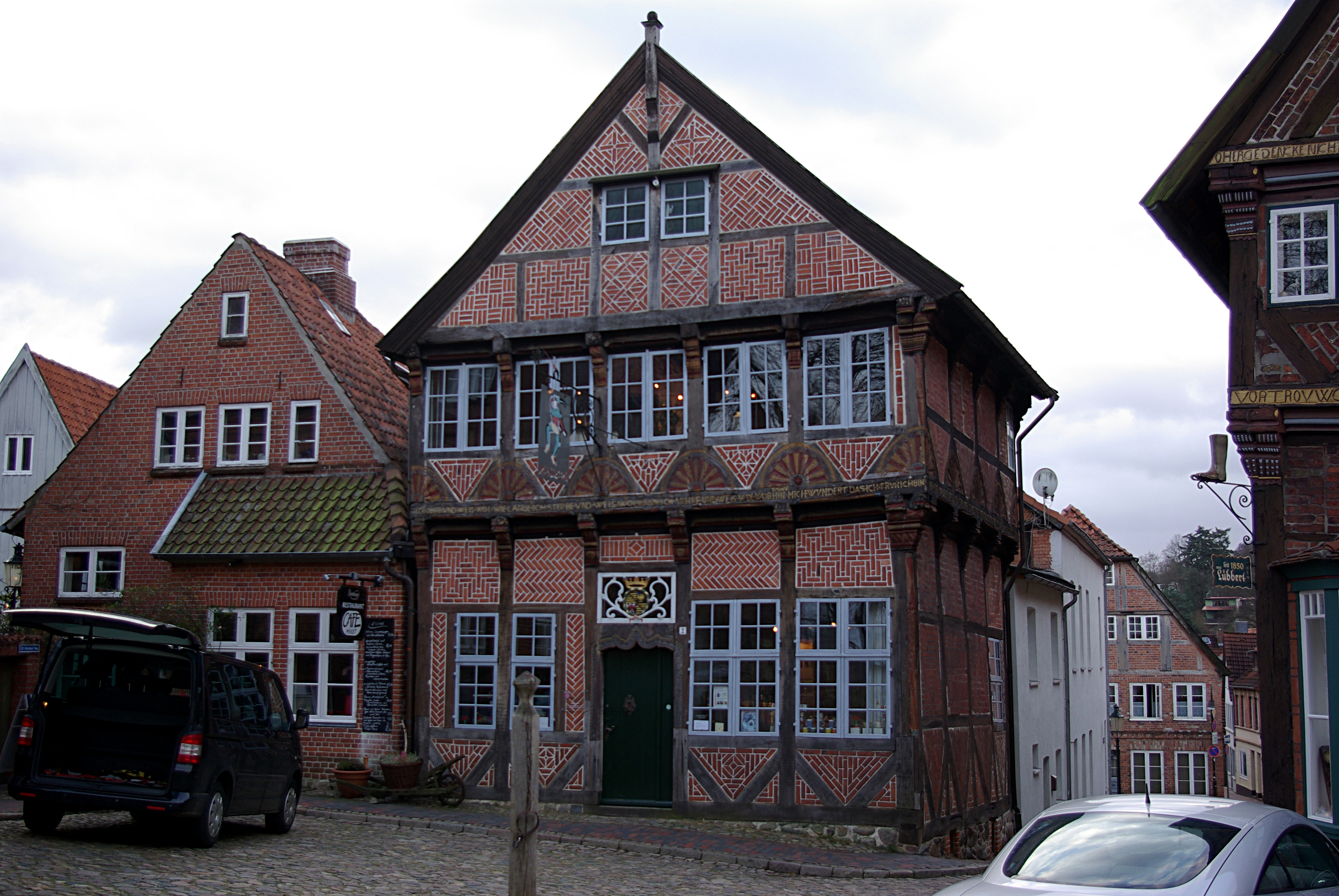 Mölln in Schleswig-Holstein. Das Haus Am Markt 2 steht unter Denkmalschutz.